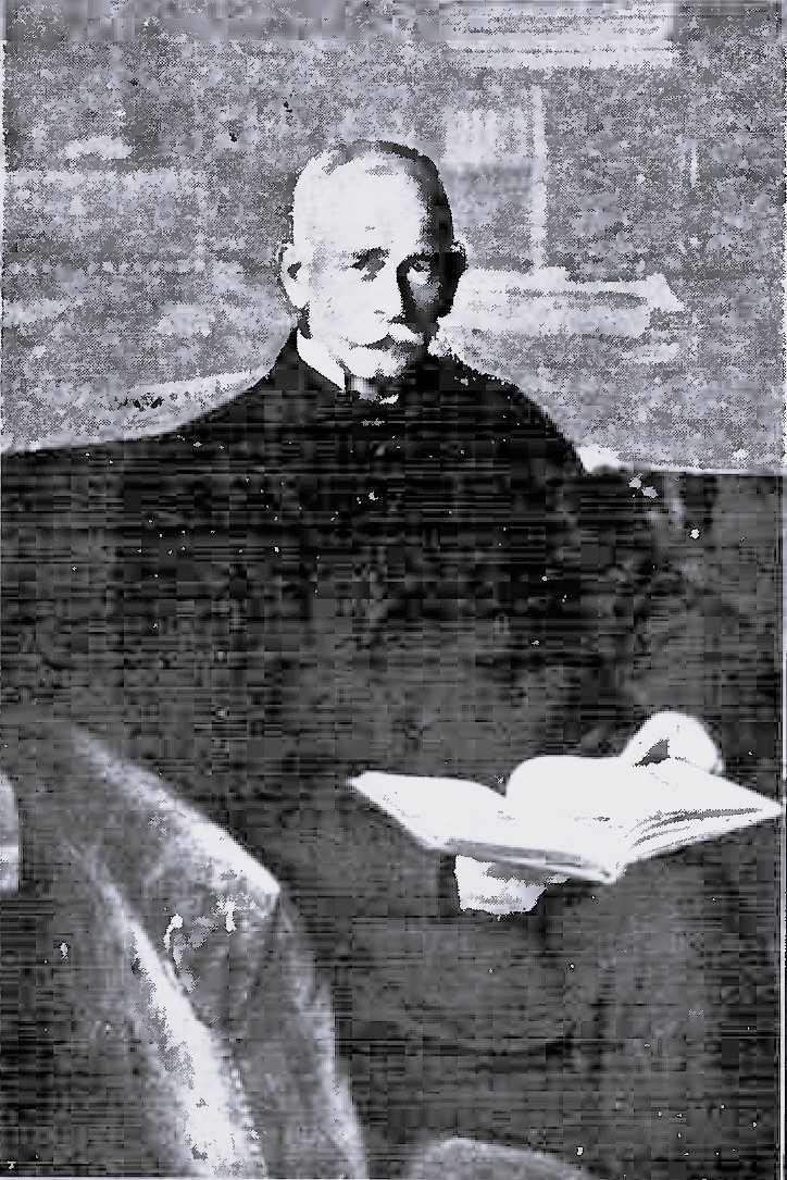 Professor Dr. Ohnesorge.